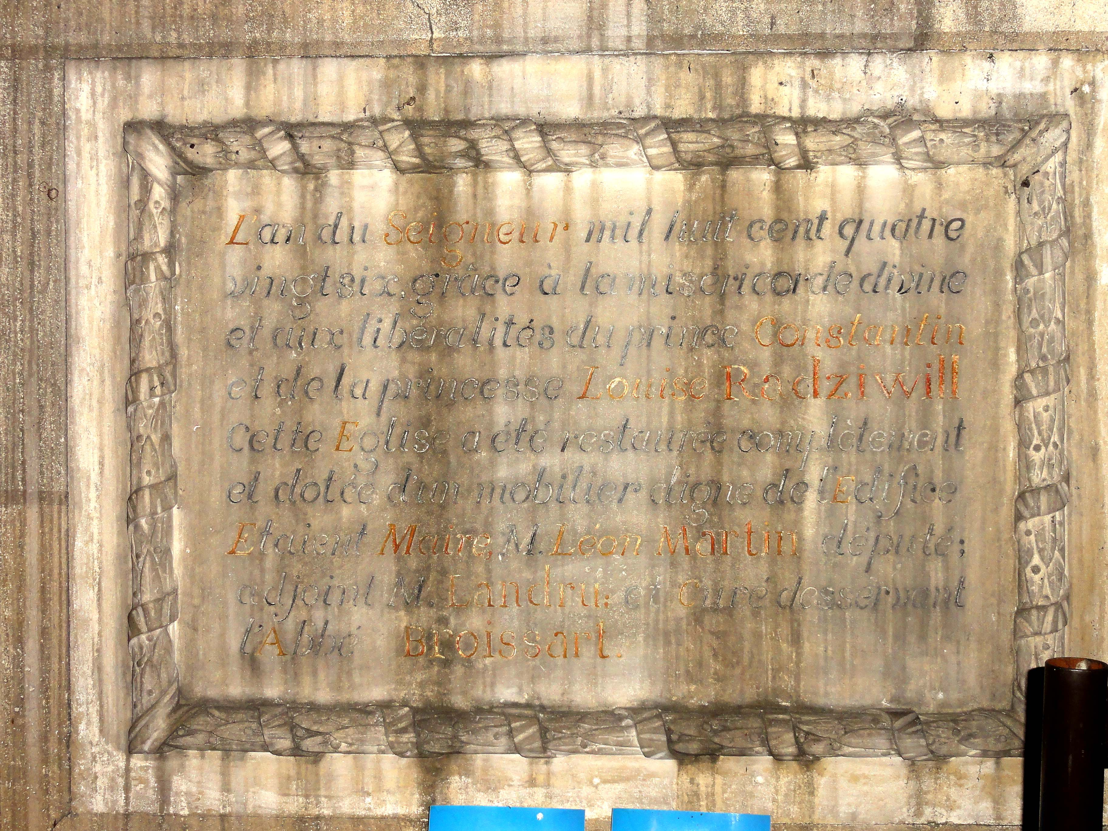 Voir titre.